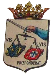 Brasão de São Luís do Maranhão de 1674.